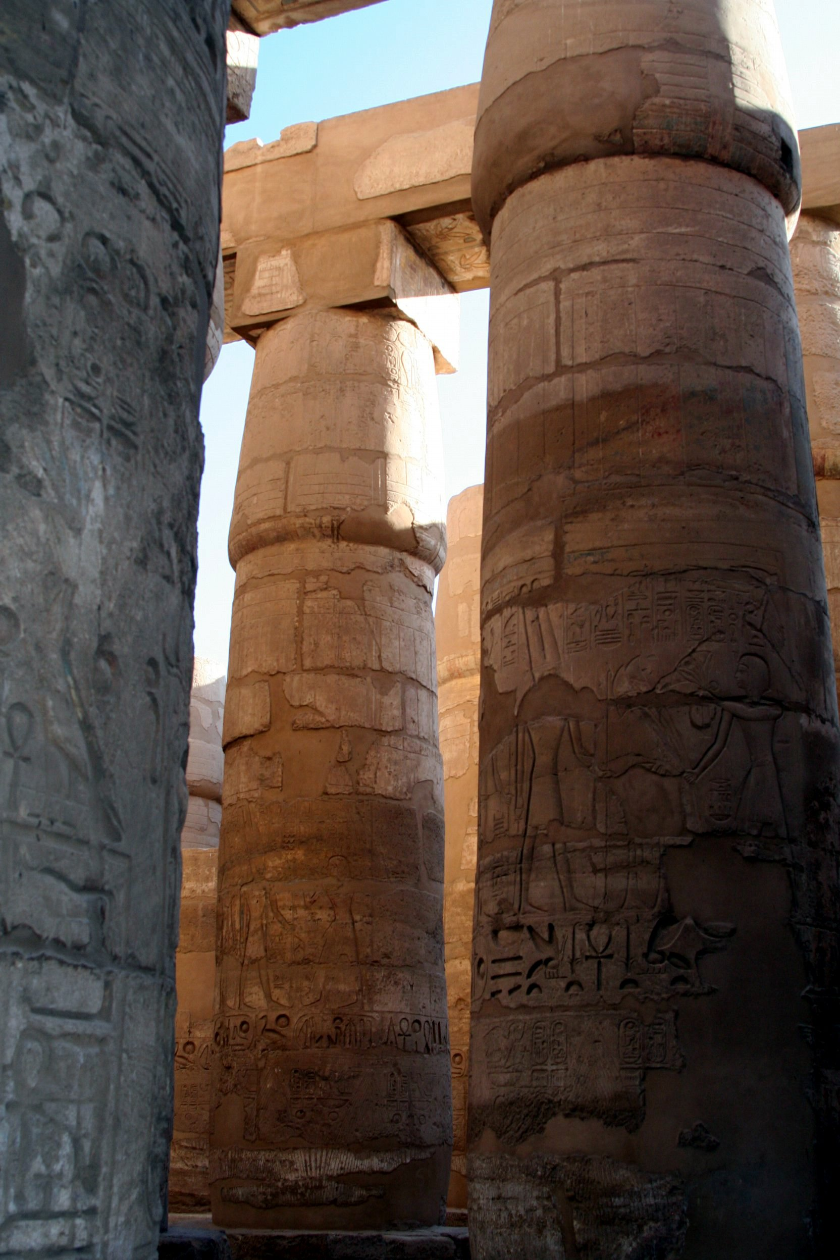 Karnak Temple at Luxor